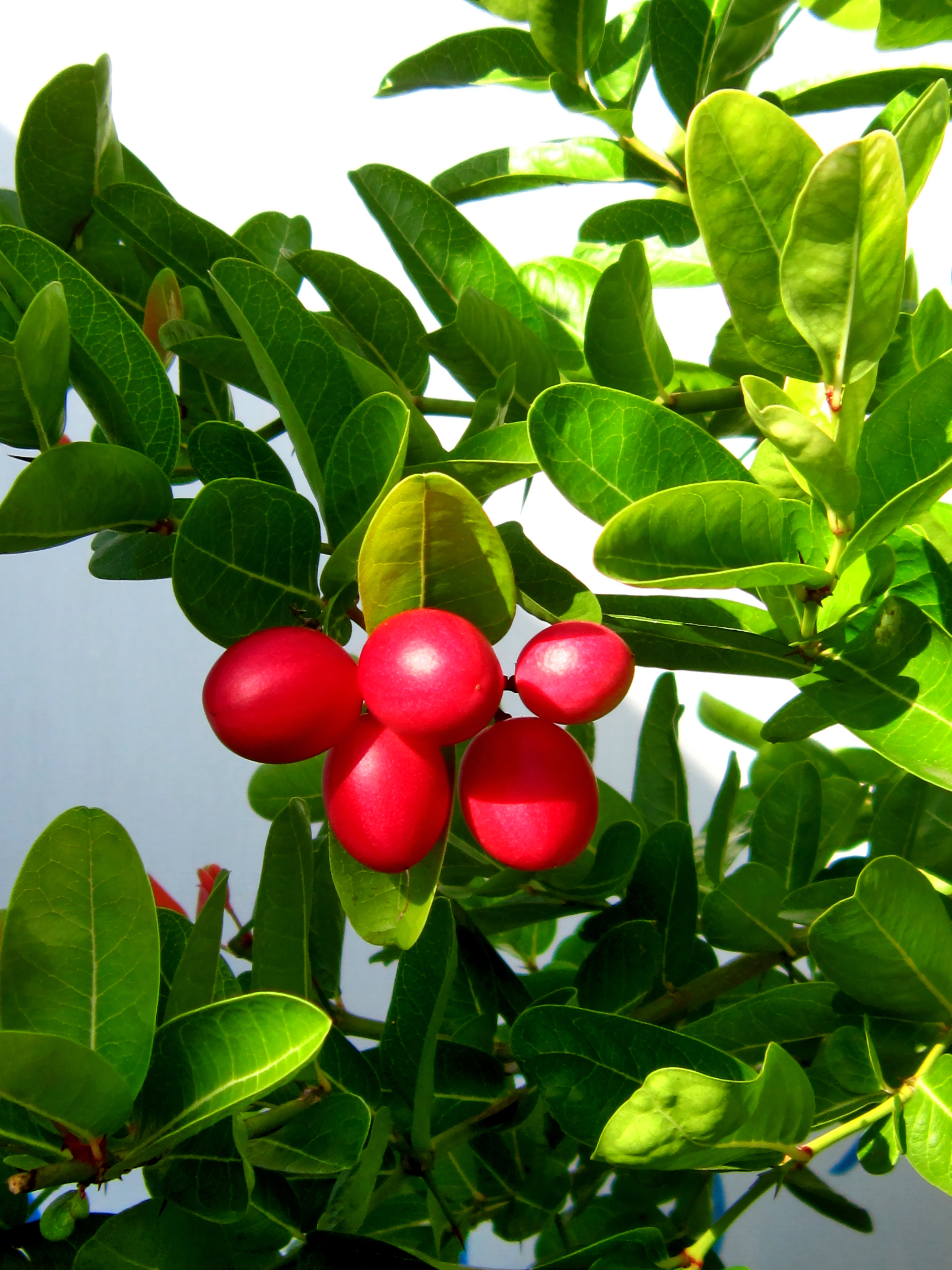 Quả và lá cây Si rô tên tiếng Anh gọi là Carissa carandas.